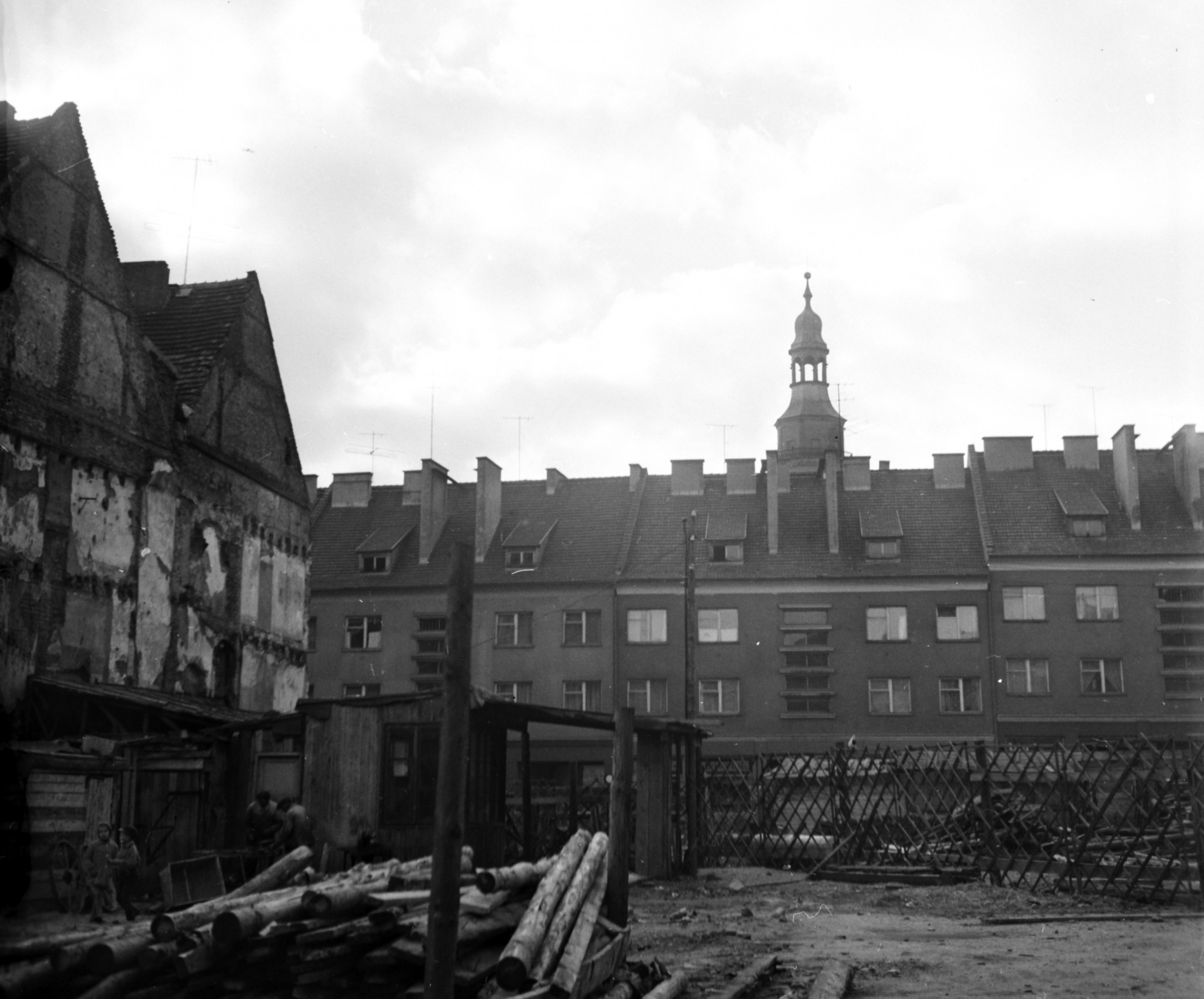 Rynek w Prudniku w 1961.